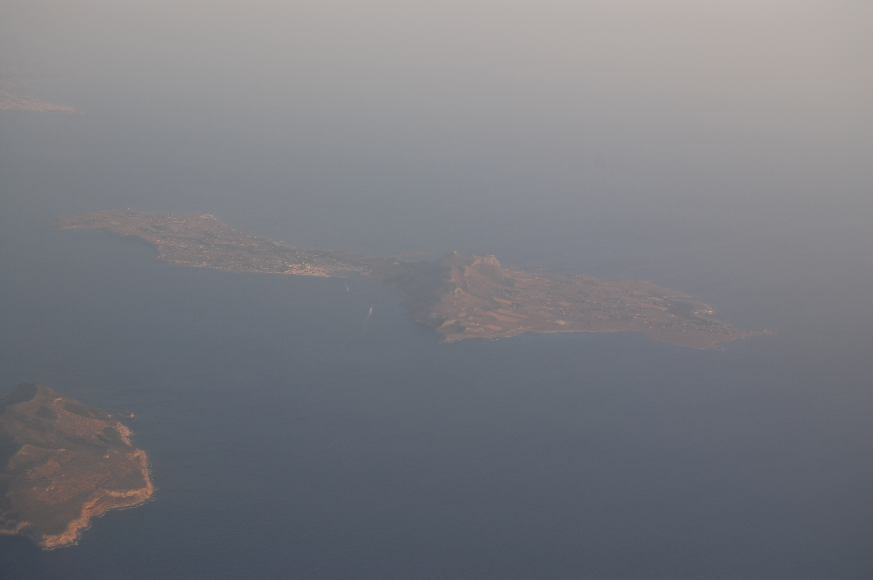 Isole Egadi: Favignana.